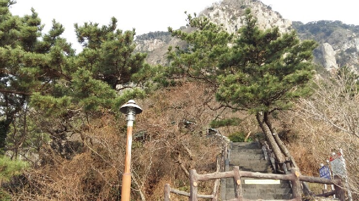 한국어 (조선): 산방산의 등산로를 촬영함